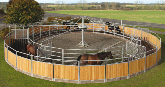 Führanlage rund